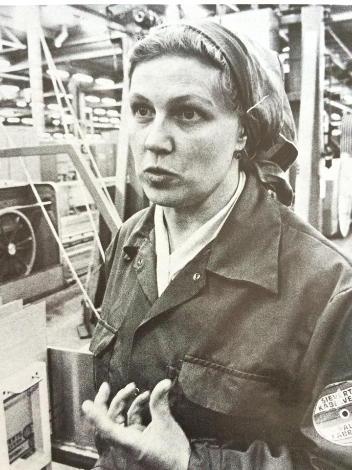 Gunnel Ehrstedt på Sieverts Kabelfabrik i Falun i samband med att hon blev avskedad